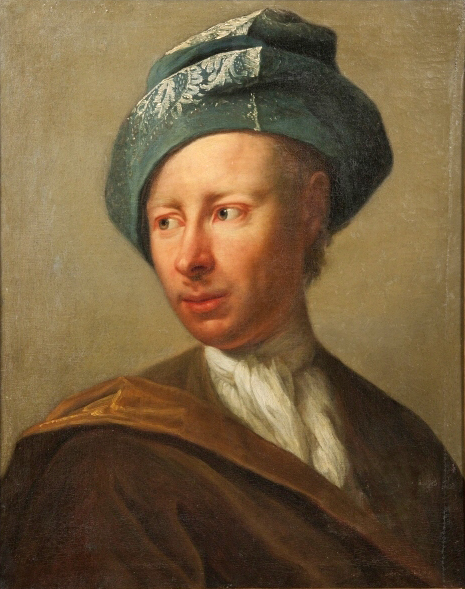 KONSTNÄR Johann Gottfried Tannauer TITLE Gustaf Abraham Piper (1692-1761), generalmajor, landshövding i Österbotten, g.m. 1. Eleonora Gustaviana Tungel, 2. friherrinnan Märta Christina Margareta Sture IDENTIFIER NMGrh 5088 MATERIALS AND TECHNIQUES Olja på duk DIMENSIONS Mått 58 x 47 cm Påskrift:Capitain af Lif Gaardet // Her: Gustaf Abraham // Piper // Ætat: 32. [A.t., duk, över hälften, svart färg] ; född 1692 † 1761 [a.t., duk, nedanför mitten, t.v, svart färg] ; General G. A. Piper 1692 † 1761 [a.t., spännram, nedtill i mitten] Signerad: Petersburg 1726 // Dannhauer ; S:t Petersburg 1726 [A.t., duk, nedre högra hörnet, svart färg] This work is in the public domain in its country of origin and other countries and areas where the copyright term is the author's life plus 70 years or less. You must also include a United States public domain tag to indicate why this work is in the public domain in the United States. Note that a few countries have copyright terms longer than 70 years: Mexico has 100 years, Jamaica has 95 years, Colombia has 80 years, and Guatemala and Samoa have 75 years. This image may not be in the public domain in these countries, which moreover do not implement the rule of the shorter term. Côte d'Ivoire has a general copyright term of 99 years and Honduras has 75 years, but they do implement the rule of the shorter term. Copyright may extend on works created by French who died for France in World War II (more information), Russians who served in the Eastern Front of World War II (known as the Great Patriotic War in Russia) and posthumously rehabilitated victims of Soviet repressions (more information). This file has been identified as being free of known restrictions under copyright law, including all related and neighboring rights.